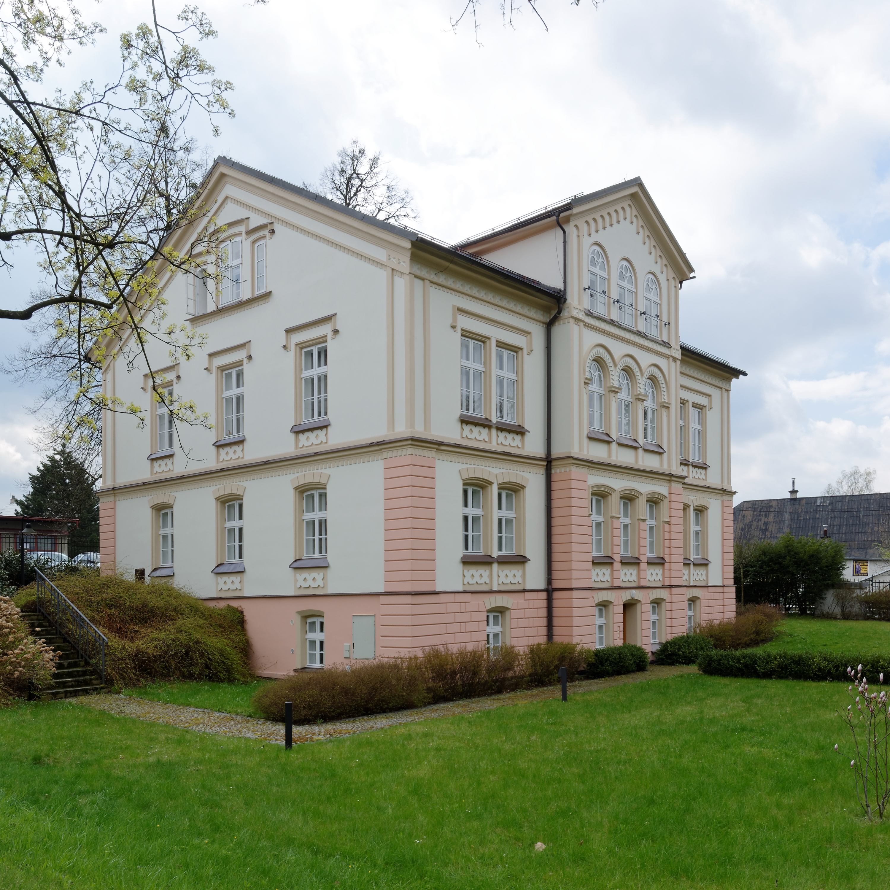 Valašské muzeum v přírodě, ředitelství.